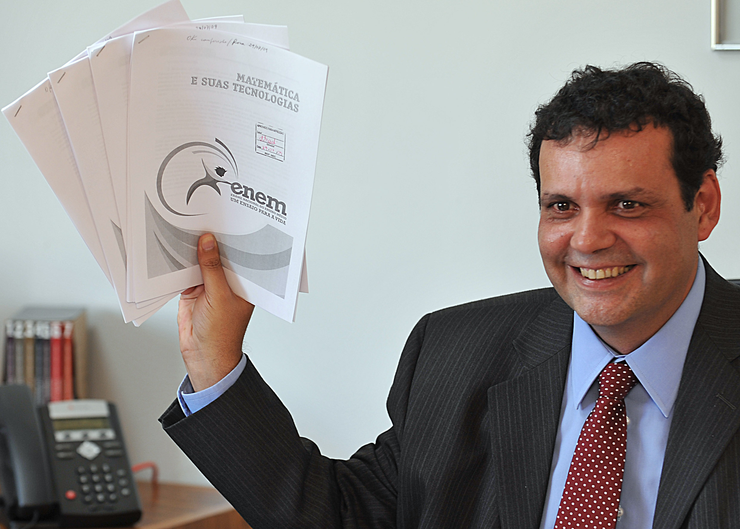 O presidente do Inep, Reynaldo Fernandes, apresenta exemplos de questões do novo Exame Nacional do Ensino Médio (Enem), que será aplicado em outubro. Segundo o Ministério da Educação, 4,5 milhões de estudantes inscreveram-se na prova.